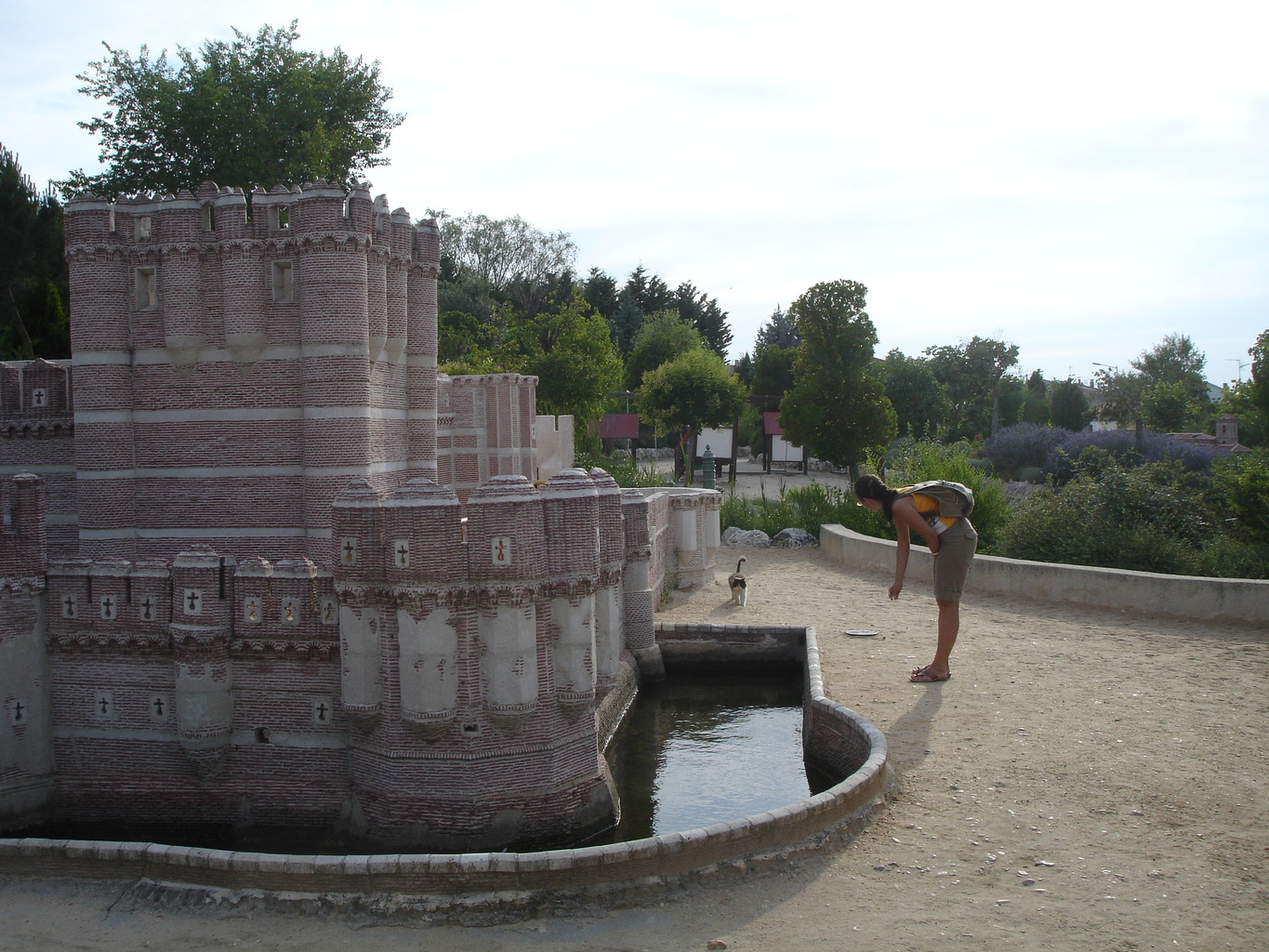 Parque temático del Mudéjar en Olmedo (Valladolid, España)